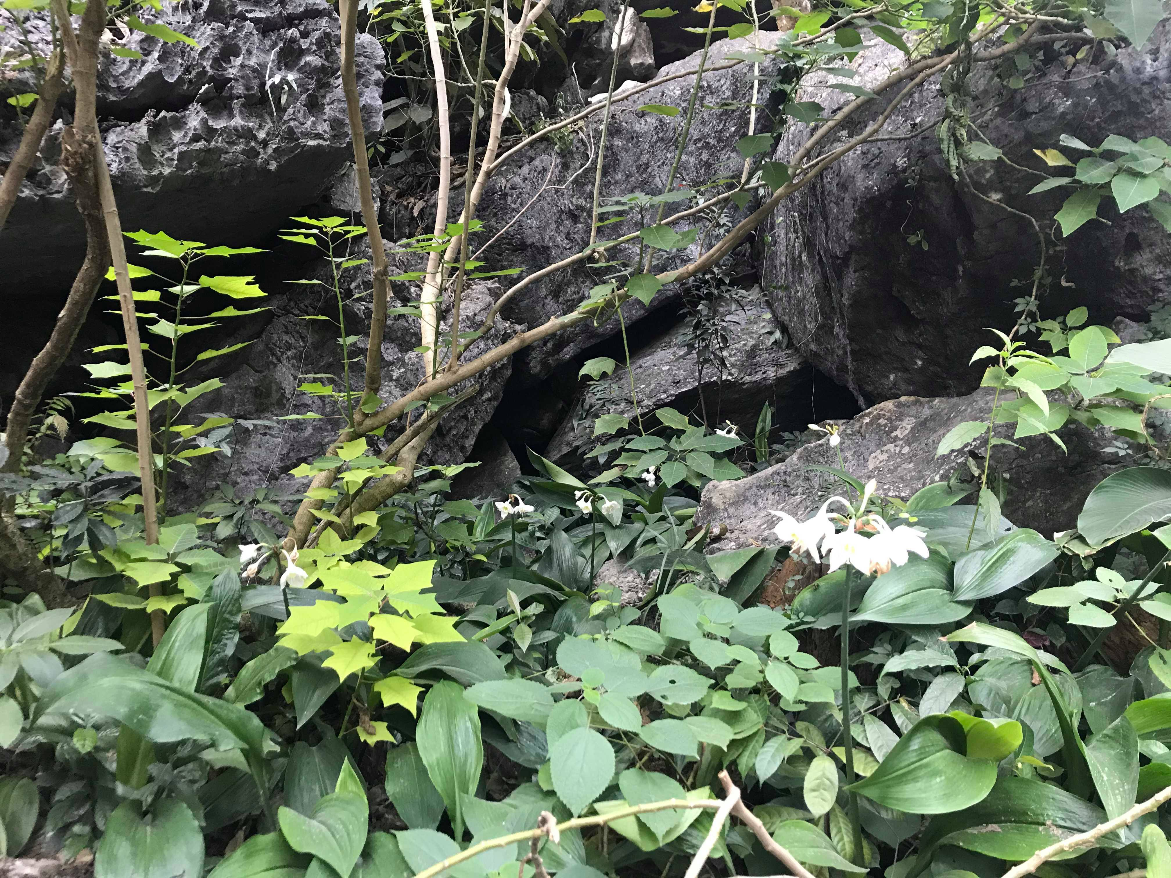 ppp